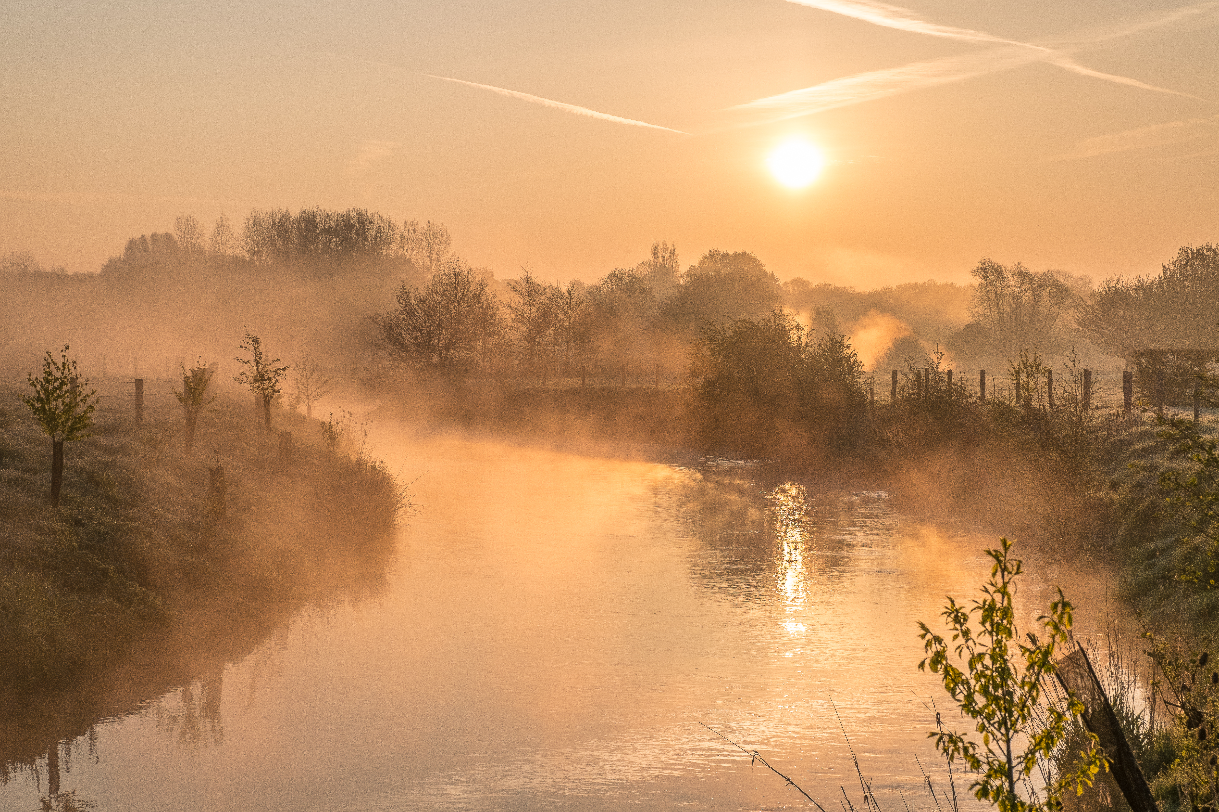 Lever de soleil brumeux se produisant au cours d'une tardive gelée de printemps.